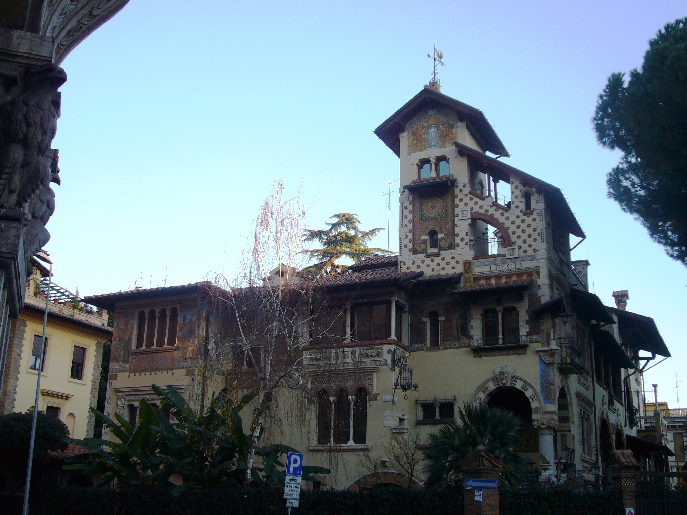 Roma, quartiere Coppedè: casa con la torretta detta "Villino delle Fate"